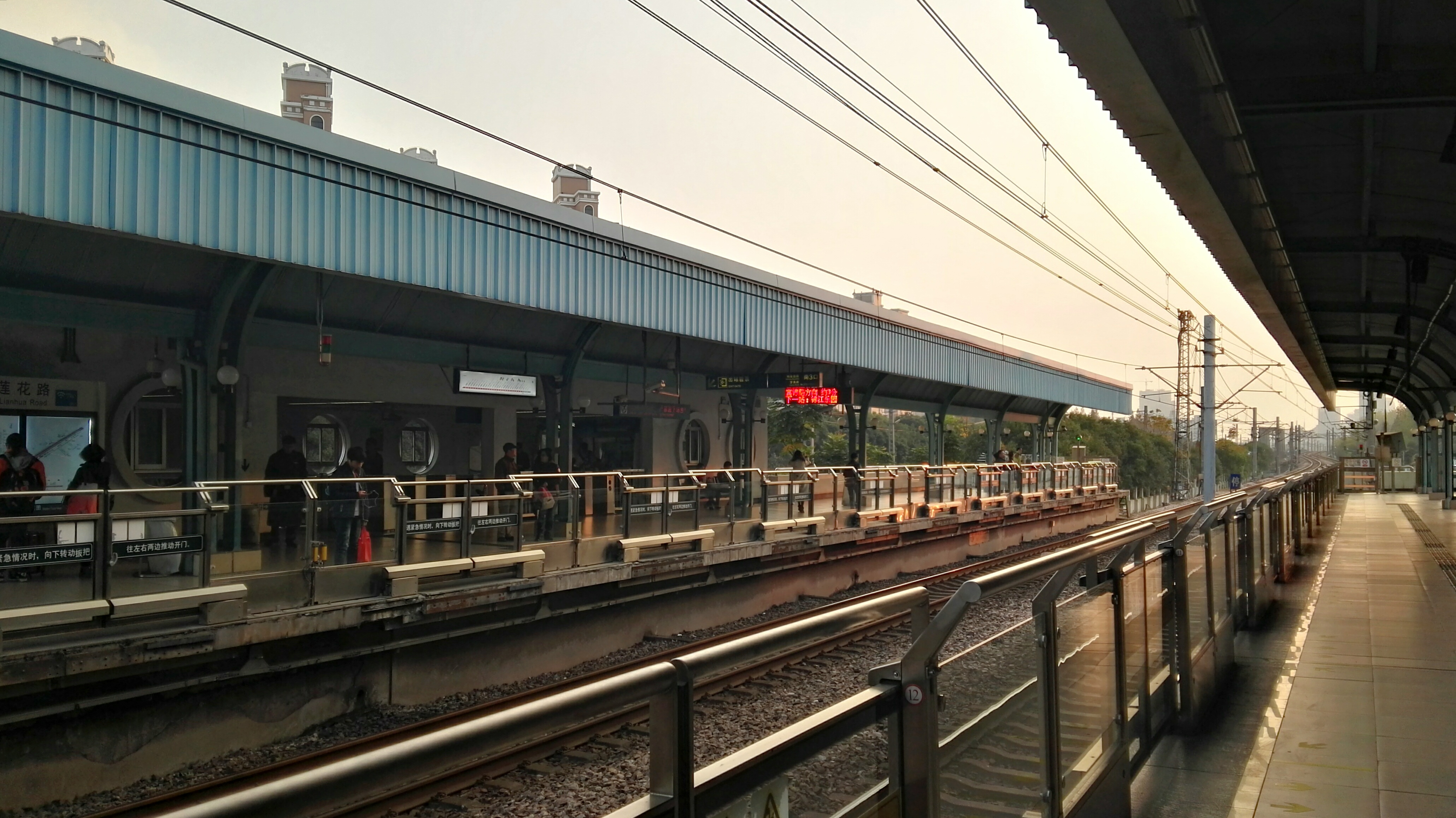 莲花路站站台